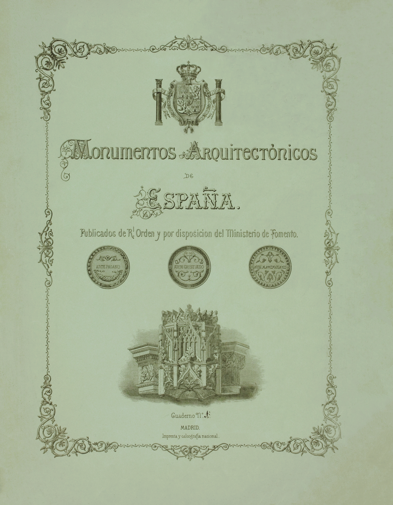 Portada de Monumentos Arquitectónicos de España (1859) versión con rayado. Aguafuerte sobre papel verdoso avitelado, de 745x600 mm. La lámina de acero correspondiente a esta estampa se conserva en la Calcografía Nacional (R. 4192).